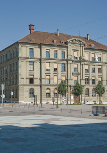 Ansicht des PROGR vom Waisenhausplatz